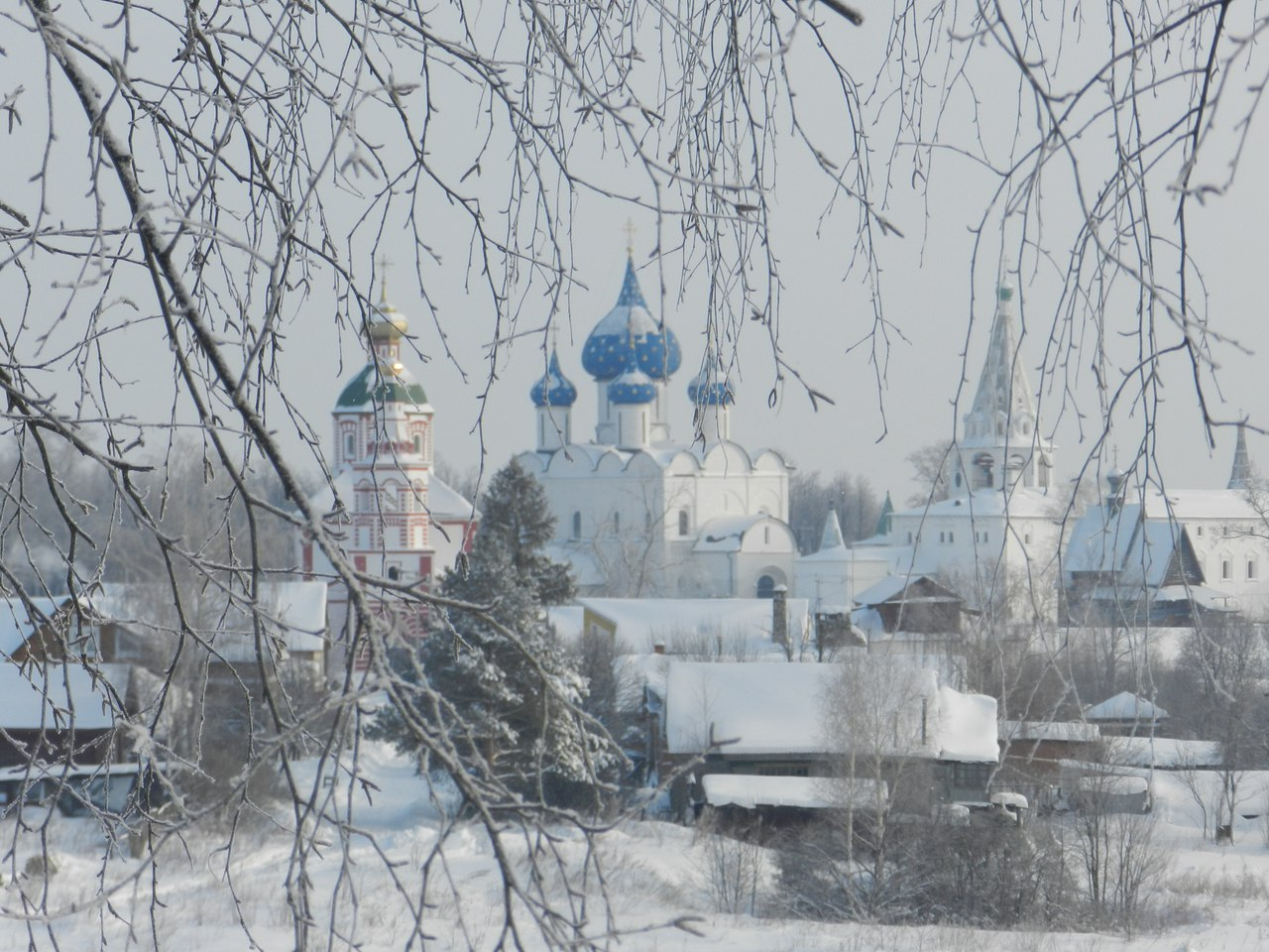 Вид на Кремль и Ильинскую церковь